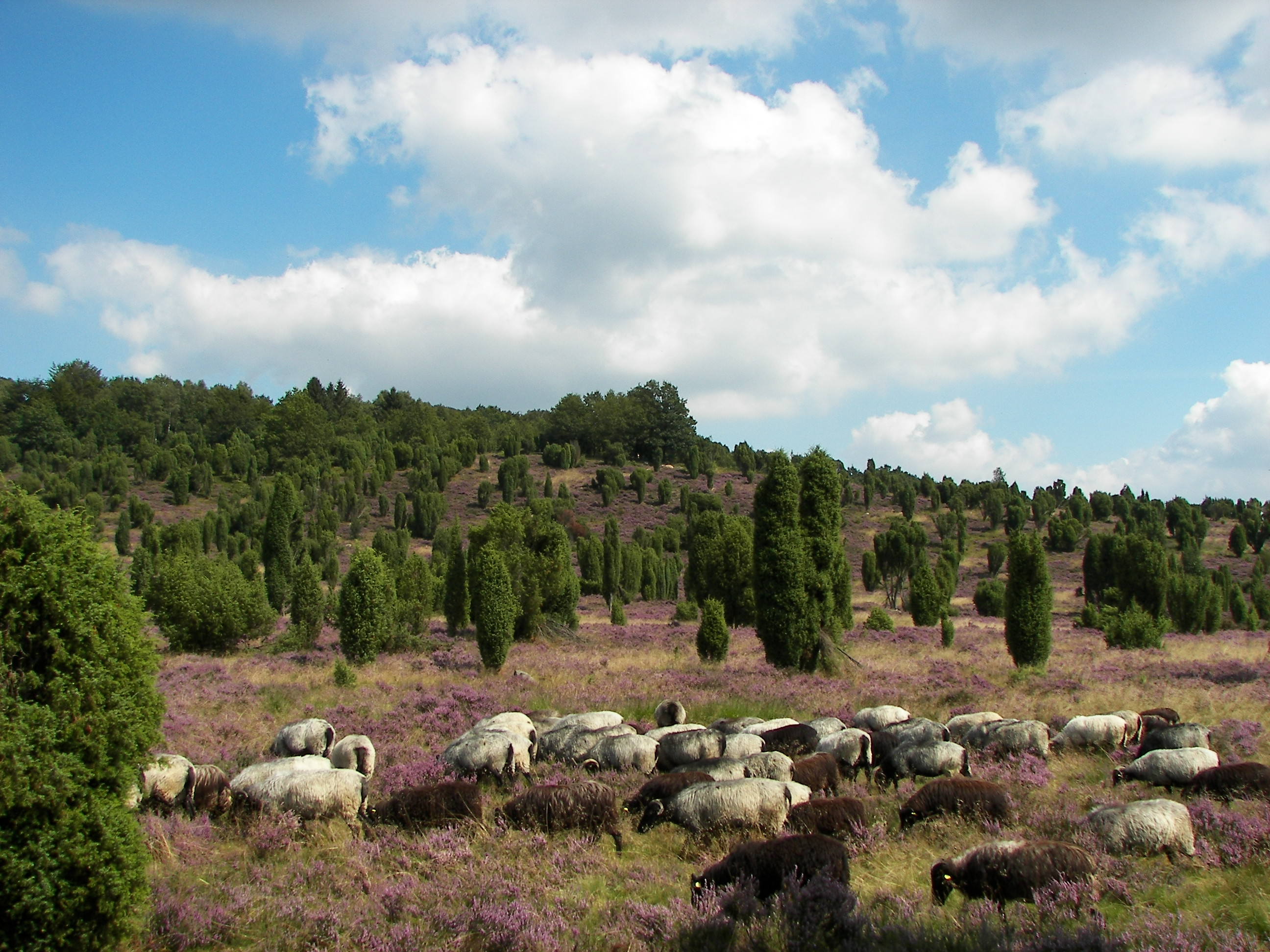 Heidschnucken im Steingrund, Lüneburger Heide